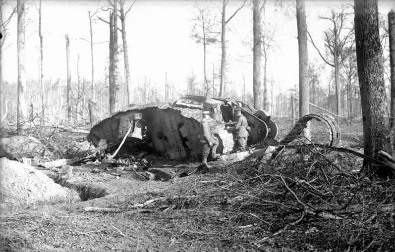 I. Weltkrieg 1914-1918 Gesprengter englischer Tank im Bourlon-Wald Information added by Wikimedia users.